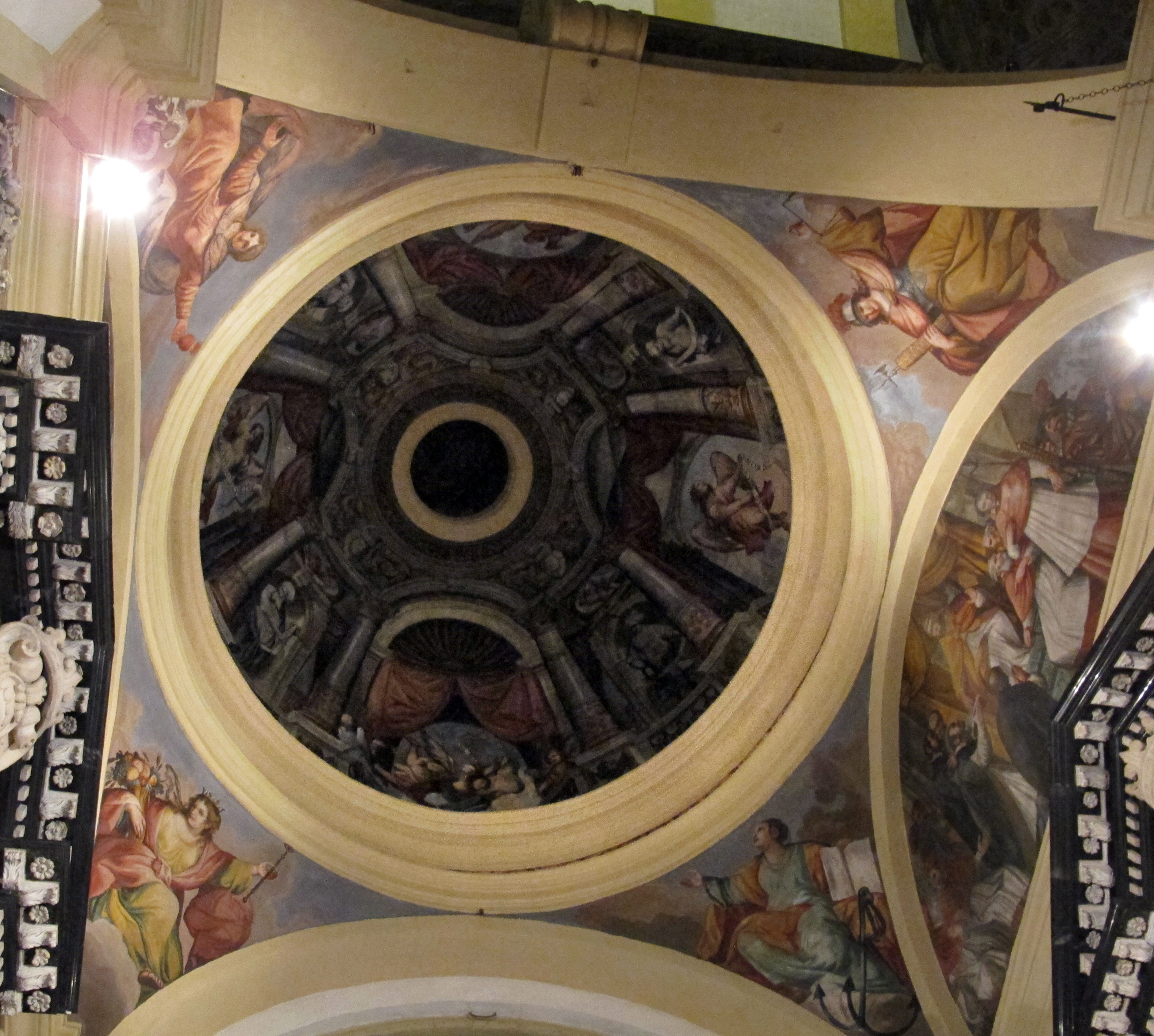 San Niccolò all'Arena, Verona